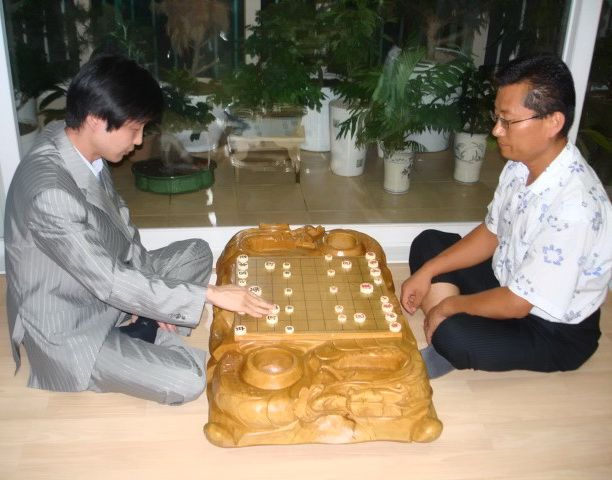 프로기사들의 친선대국. 왼편은 김경중프로, 오른편은 김동학프로이다.